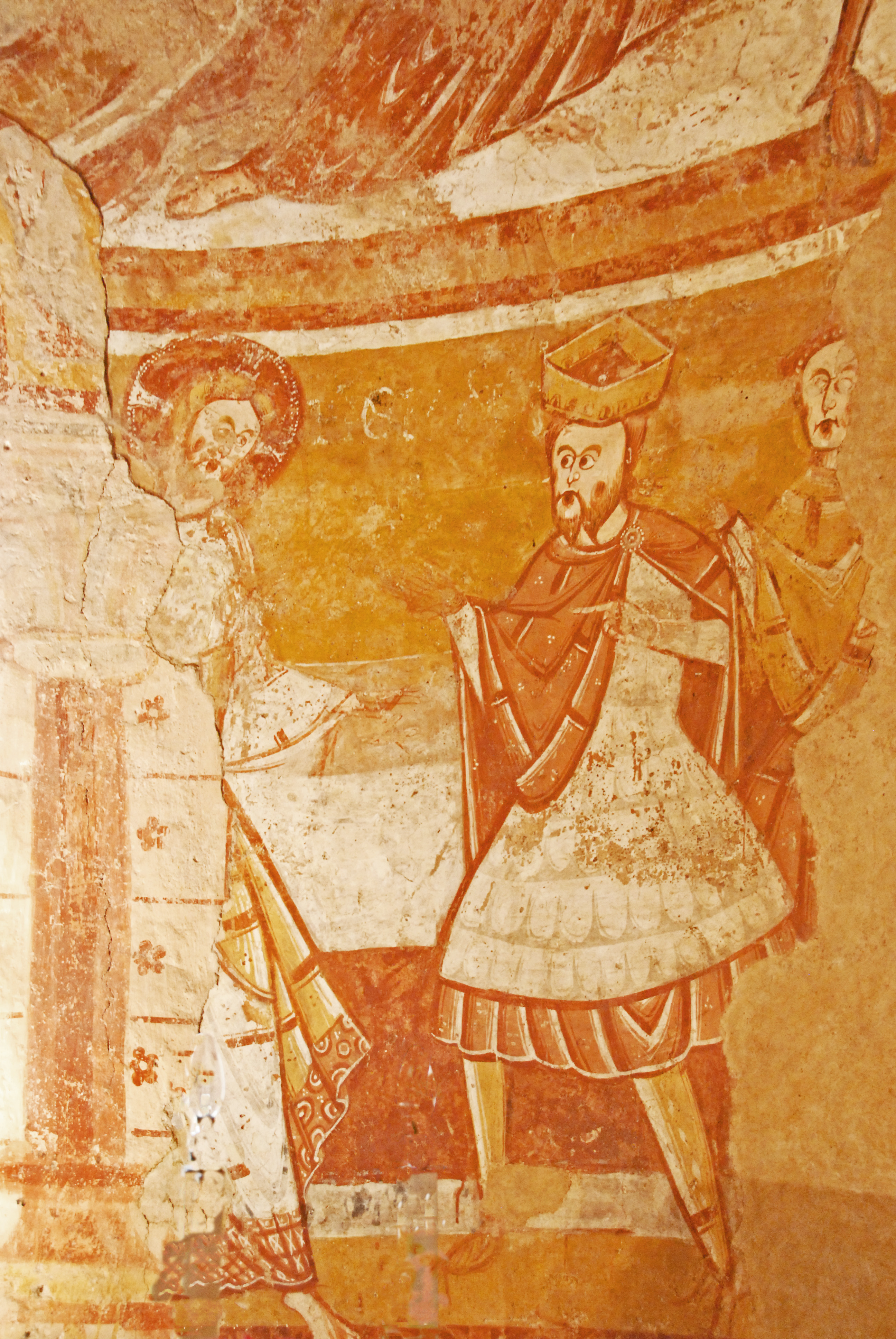 Chorapsis, rechts: Jesus vor Herodes